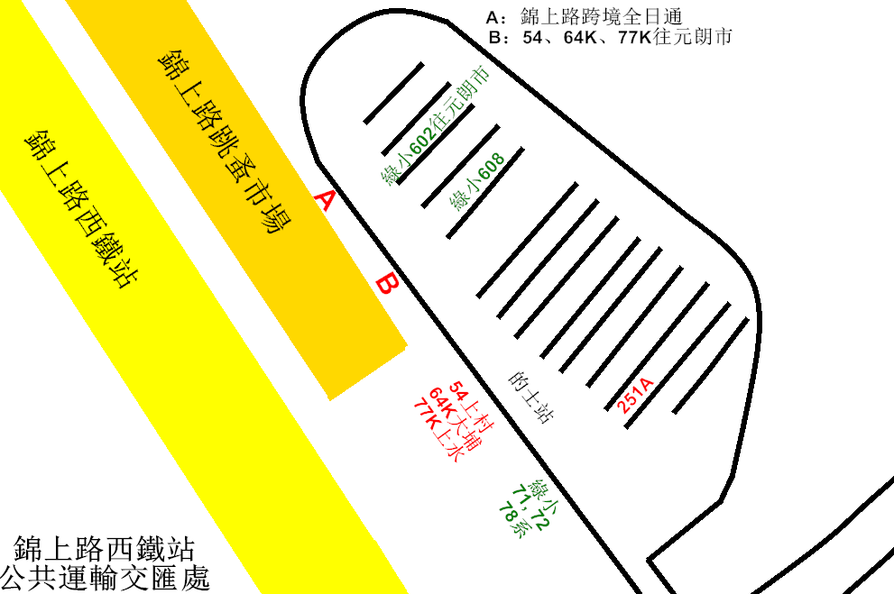 中文（香港）: 錦上路西鐵站公共交通交匯處的平面圖